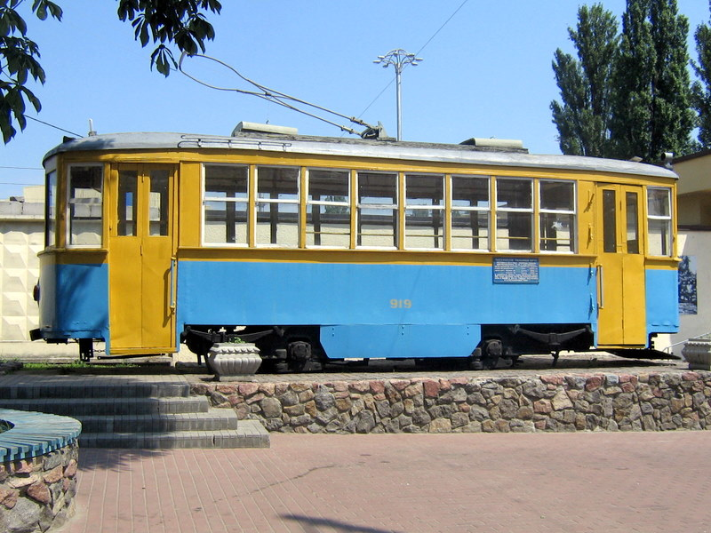 Пам'ятник старому трамваю. вул. Фрунзе. Біля трамвайного депо